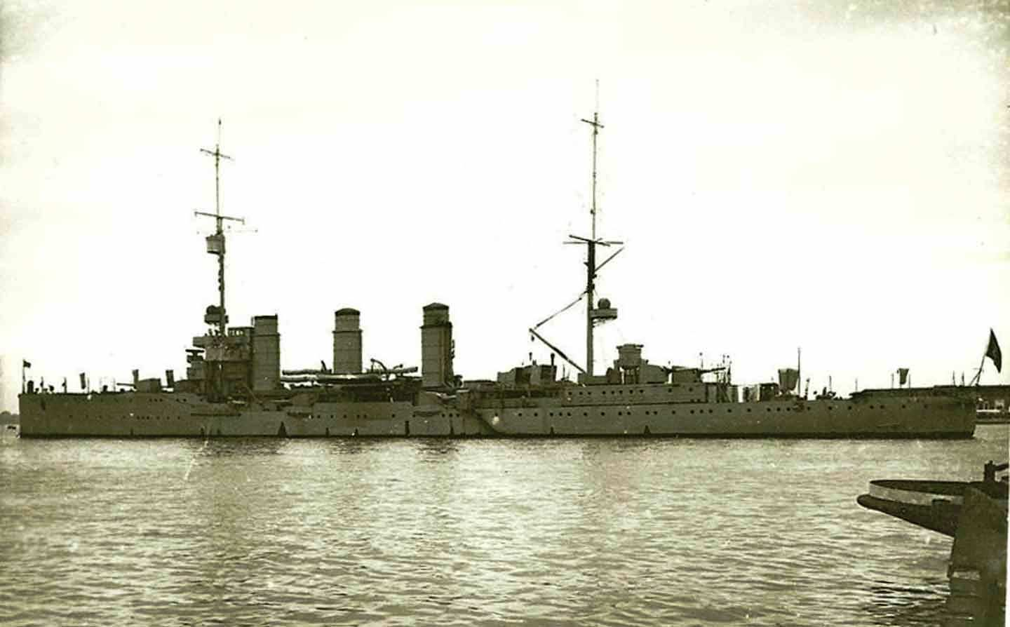 L’incrociatore leggero Bari.